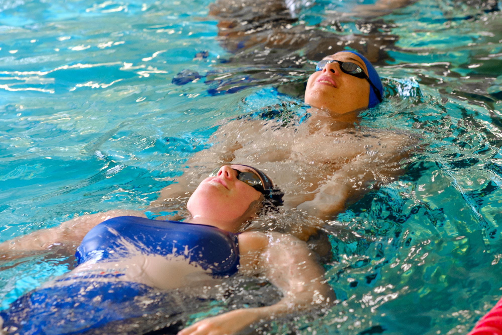 Zwei Schwimmlehrer üben das Schleppen einer Person im Wasser. Im Bild kommt der der Achsel-Schleppgriff zum Einsatz. Dieser eignet sich nicht für bewusstlose Ertrinkende!